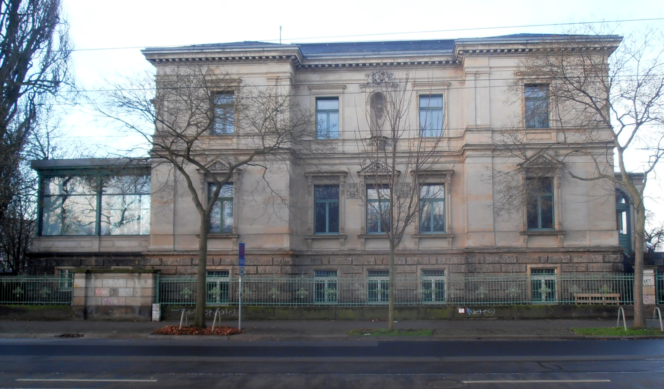 Die Grumbtsche Villa in Dresden-Leipziger Vorstadt, Blick von NO